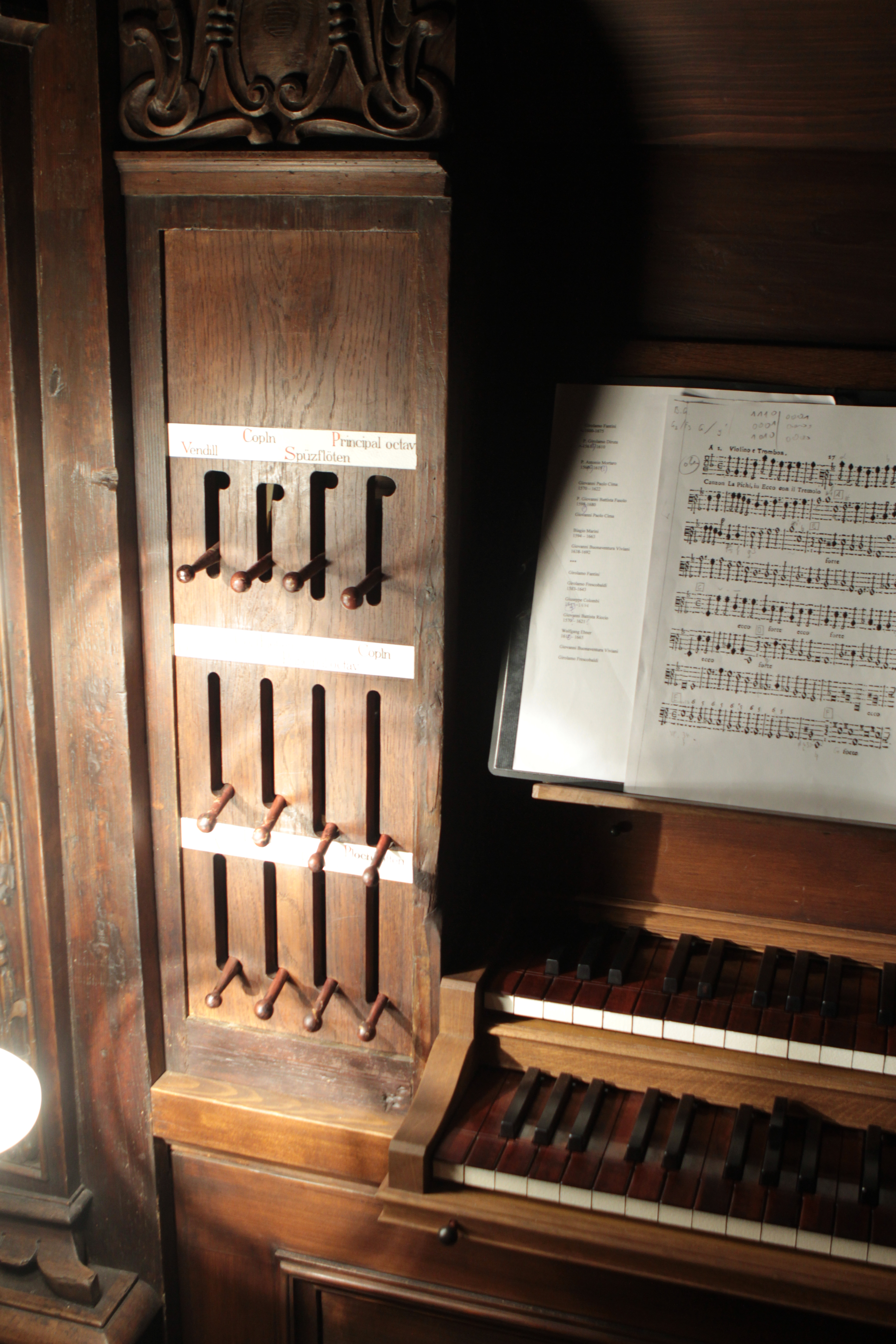 Franziskanerkirche hl. Hieronymus und -kloster